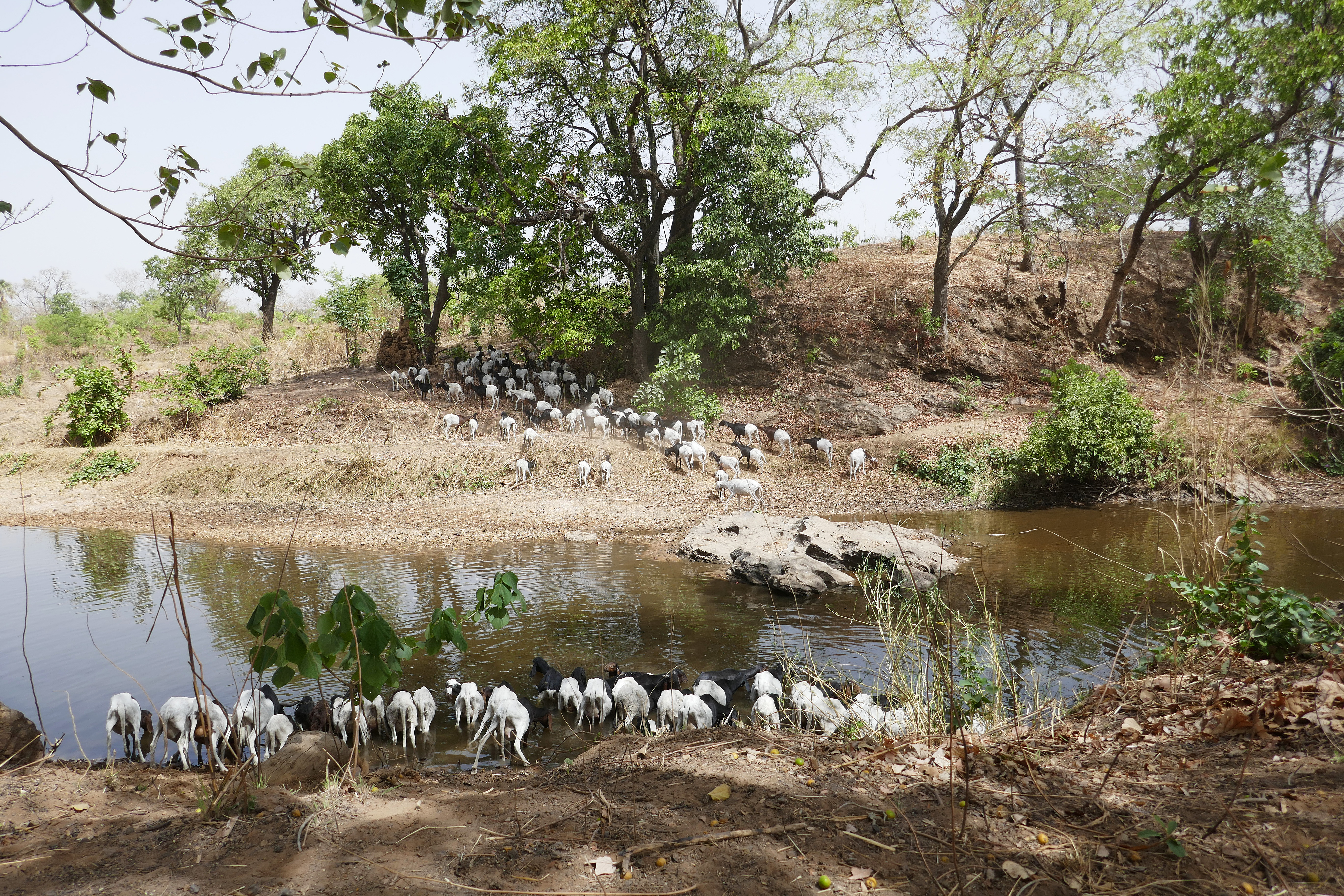 Troupeau s'abreuvant à la Koumagou entre Boukoumbé et Tanguieta (Bénin).